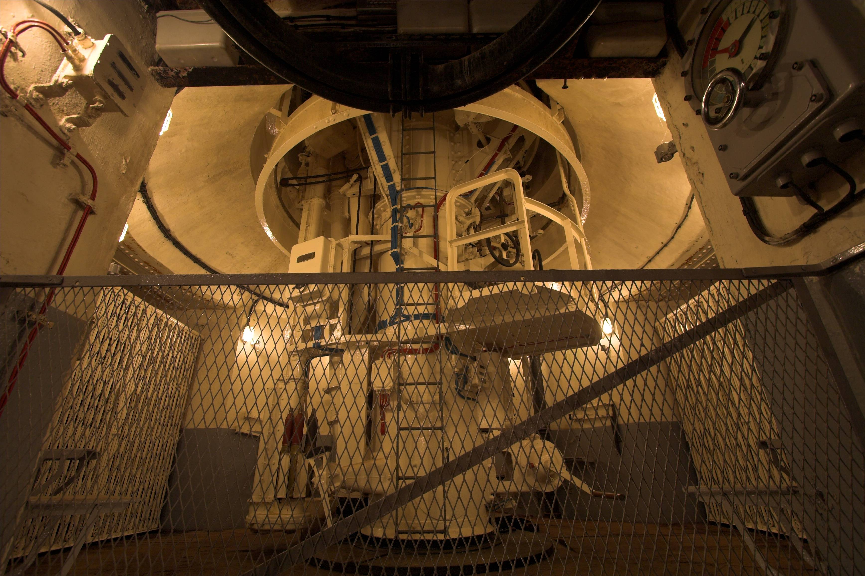 Fort Shoenenbourg(Schoenenbourg, France)